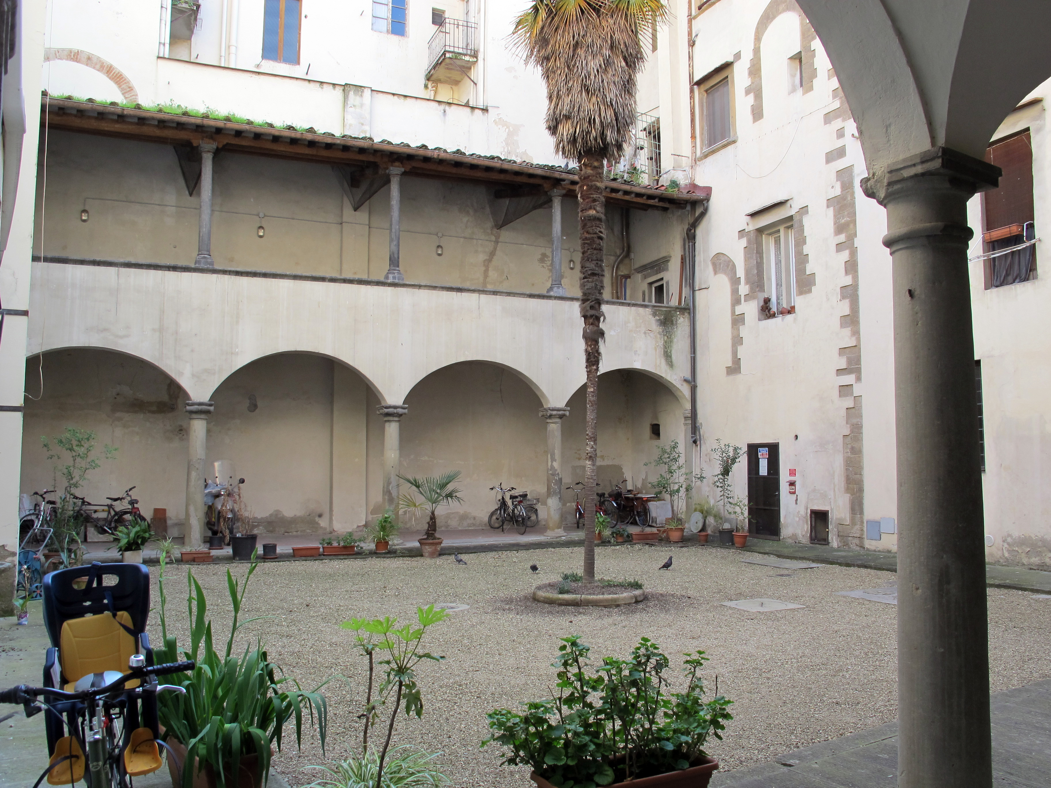 San jacopo tra i fossi, chiostro